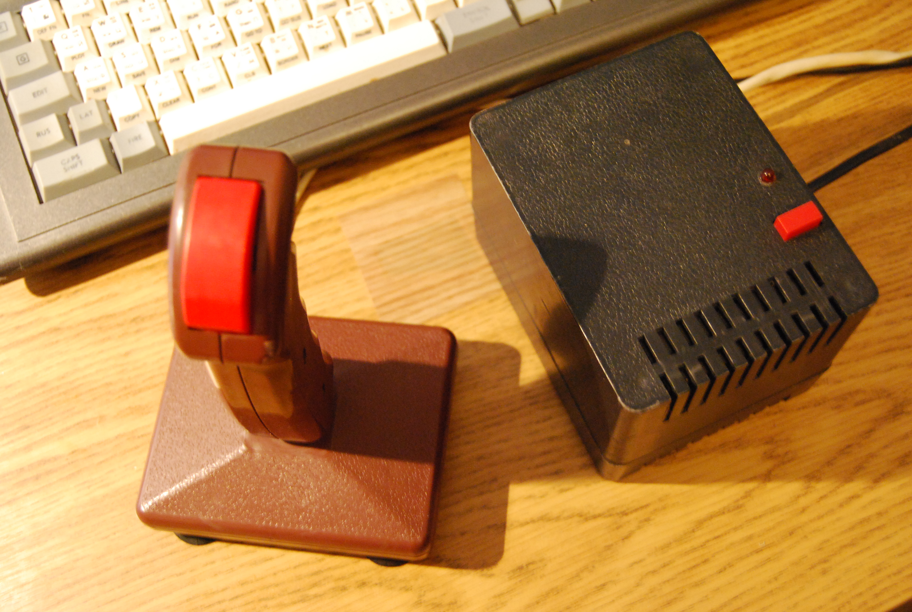 Джойстик и блок питания компьютера Компаньон-2 производства Ижевского механического завода